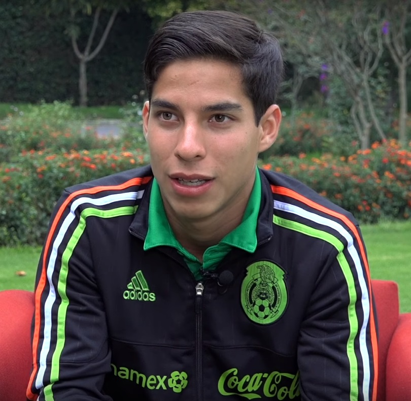 Diego Lainez en 2017.